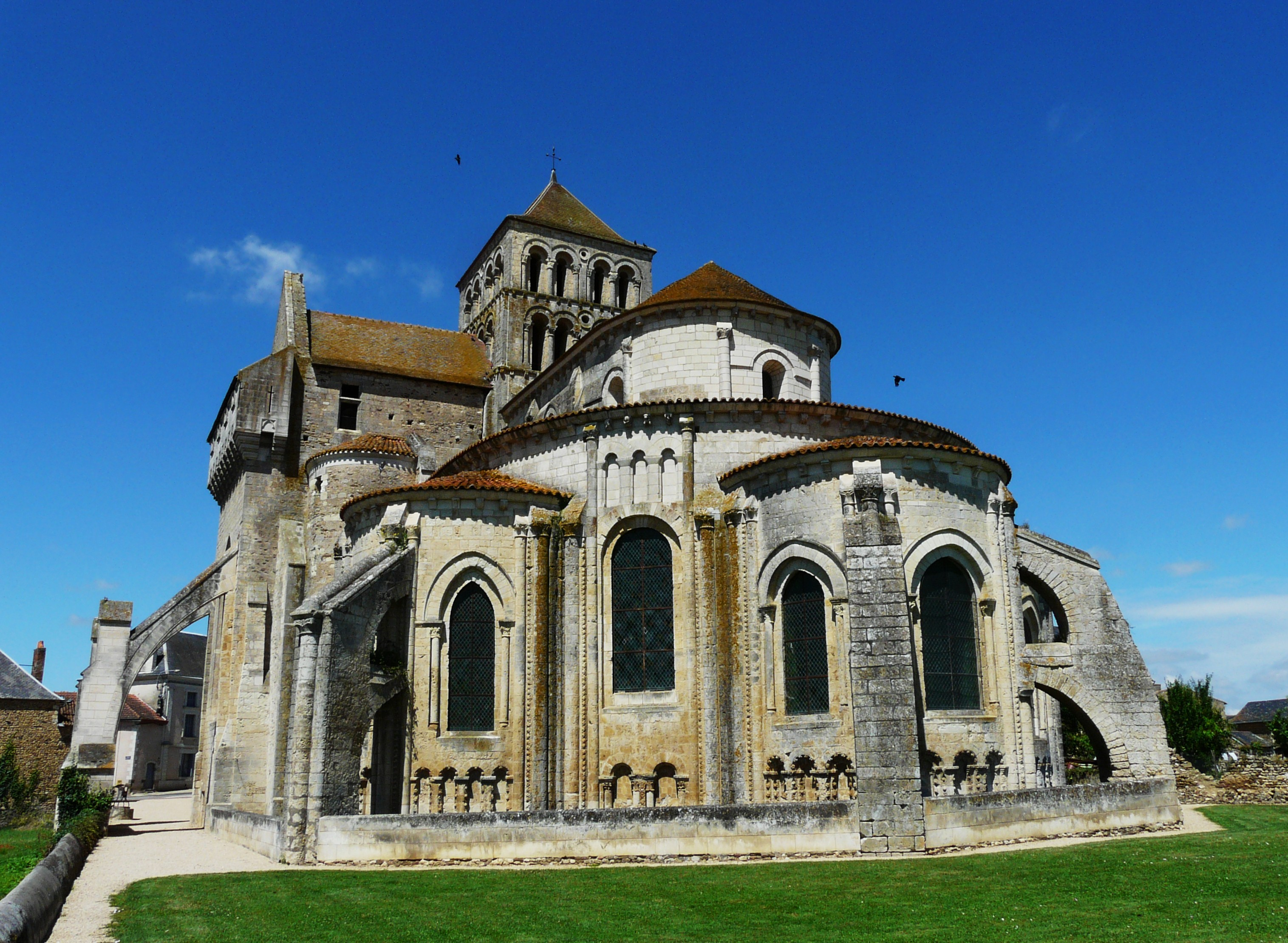 Abbaye Saint-Jouin-de-Marnes, Deux-Sèvres, France